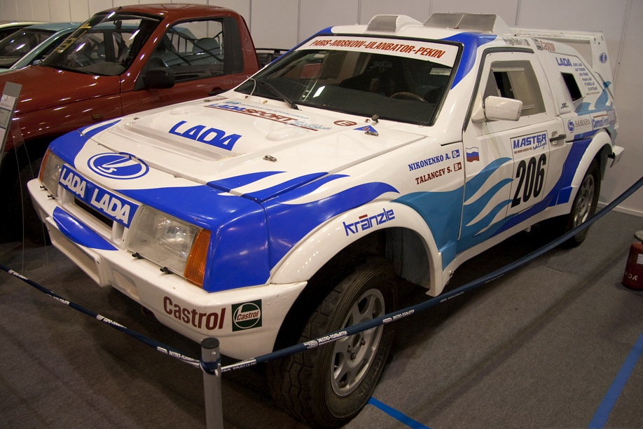 Раллийный автомобиль Lada Samara T3. 15-й Тольяттинский автосалон. Сентябрь 2010, Тольятти, Россия